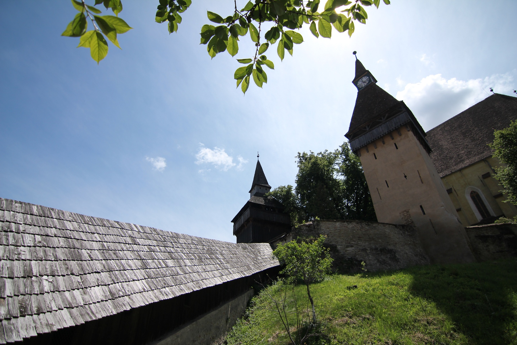 Biertan: Incintă fortificată mediană, cu bastion (azi casa paznicului) șiscară de lemn, acoperită, turn 03